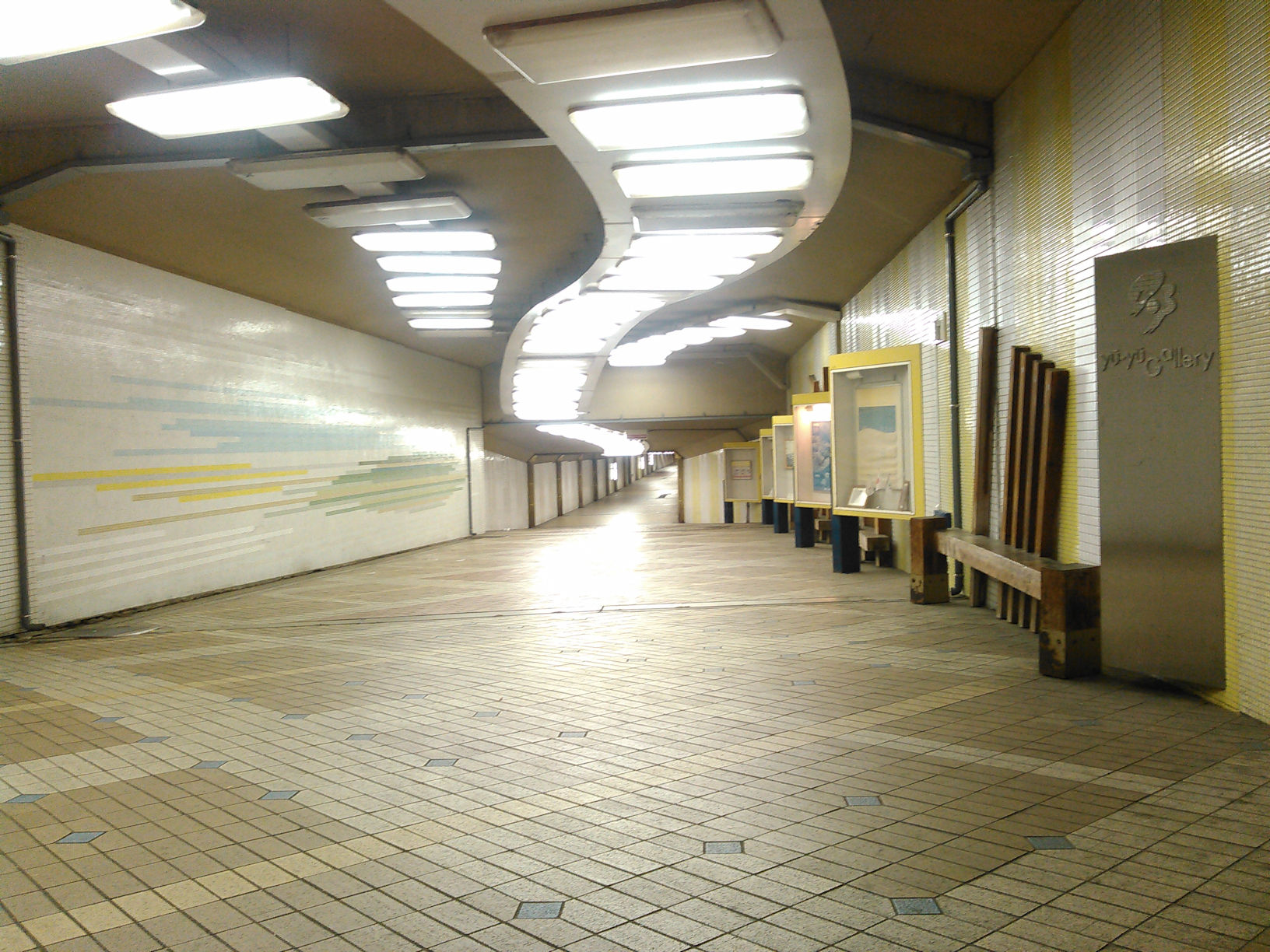 ゆうゆう地下道郡山駅西口側入口